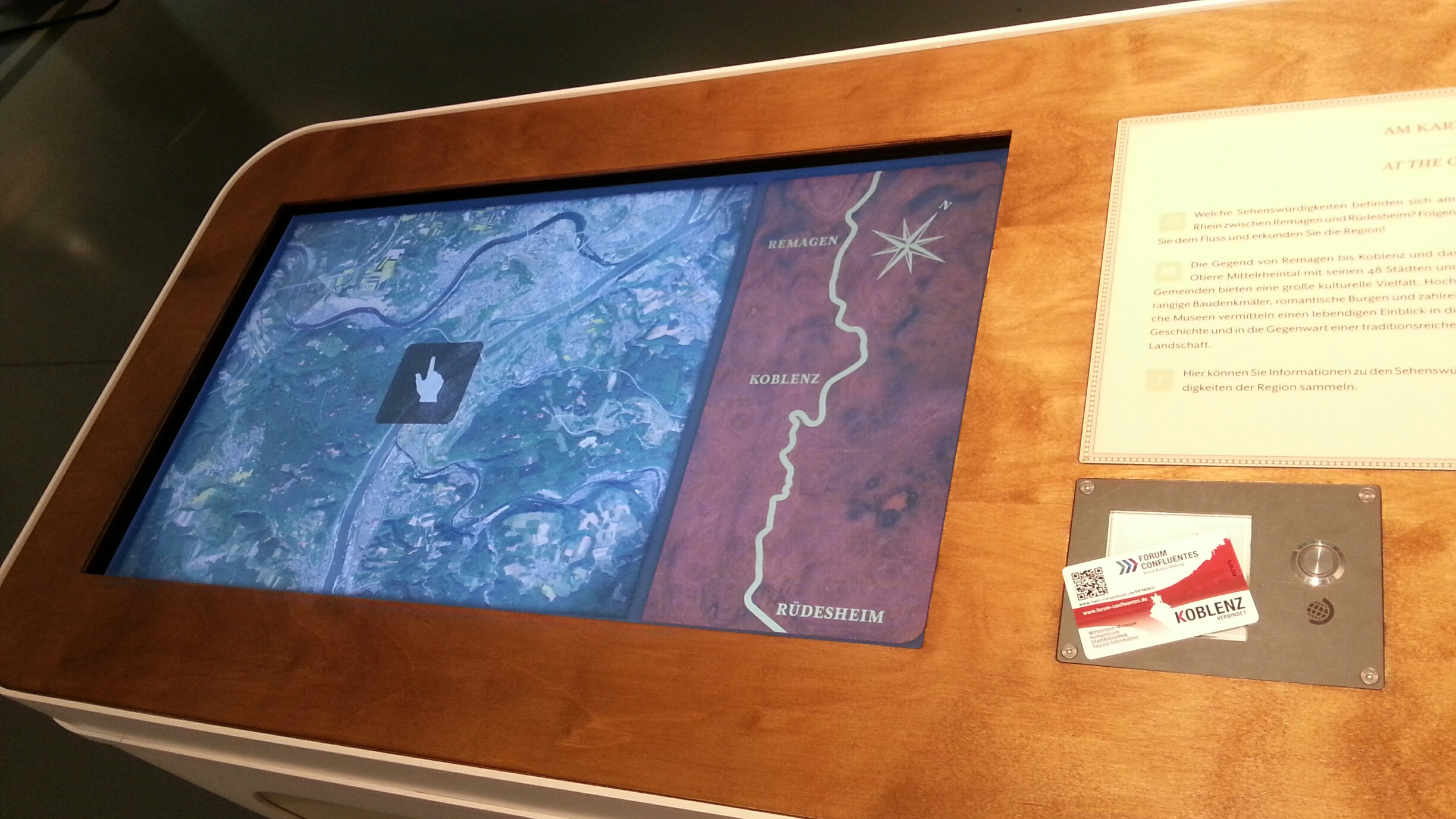 Elektronische Karte im Romanticum Koblenz